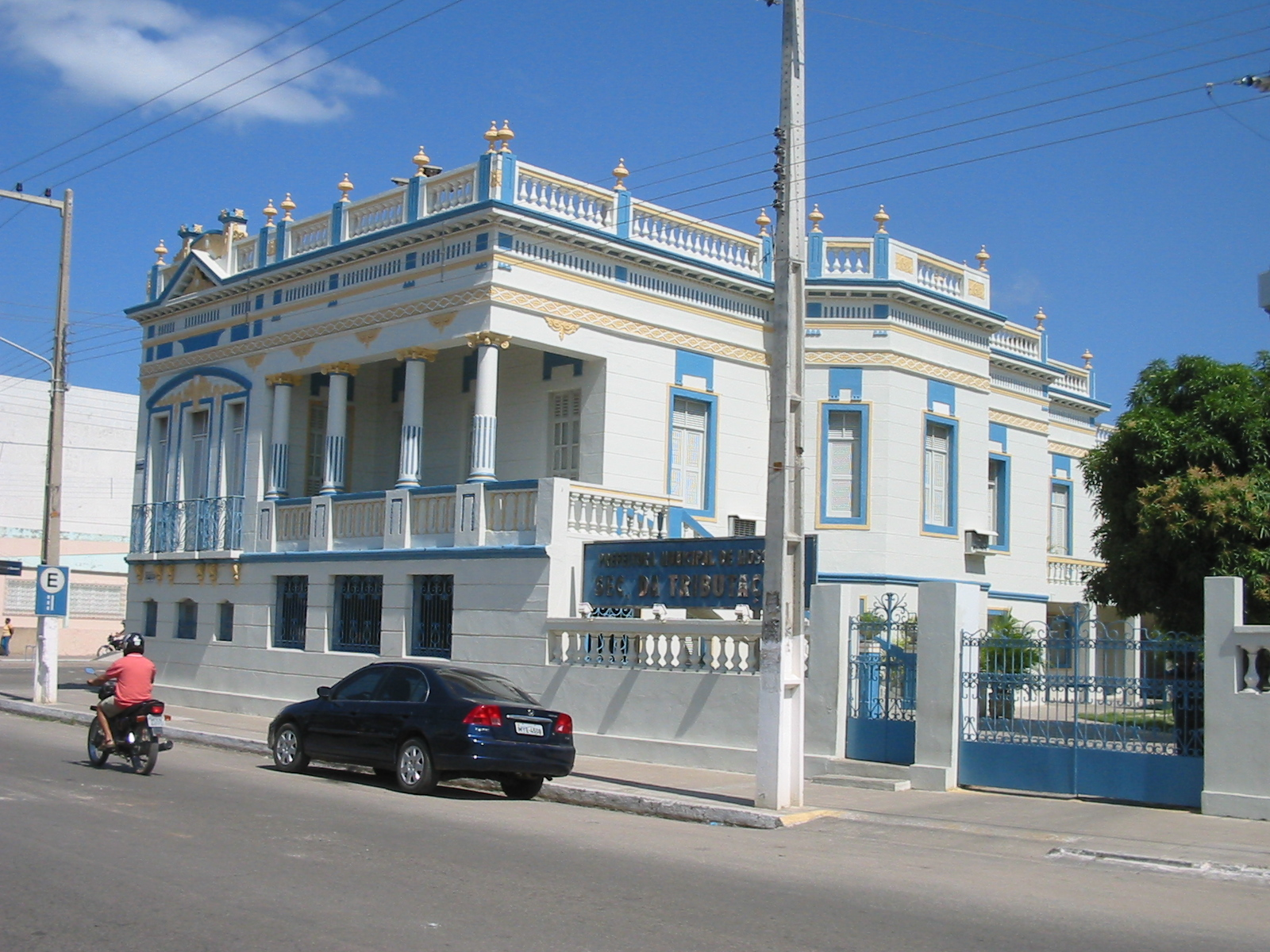 Mossoró (Rio Grande do Norte), Brasil. Secretaria Municipal da Tributação. Antiga sede da Prefeitura Municipal. Old host of the Mayor's Office. Mossoró (Rio Grande do Norte), Brazil.